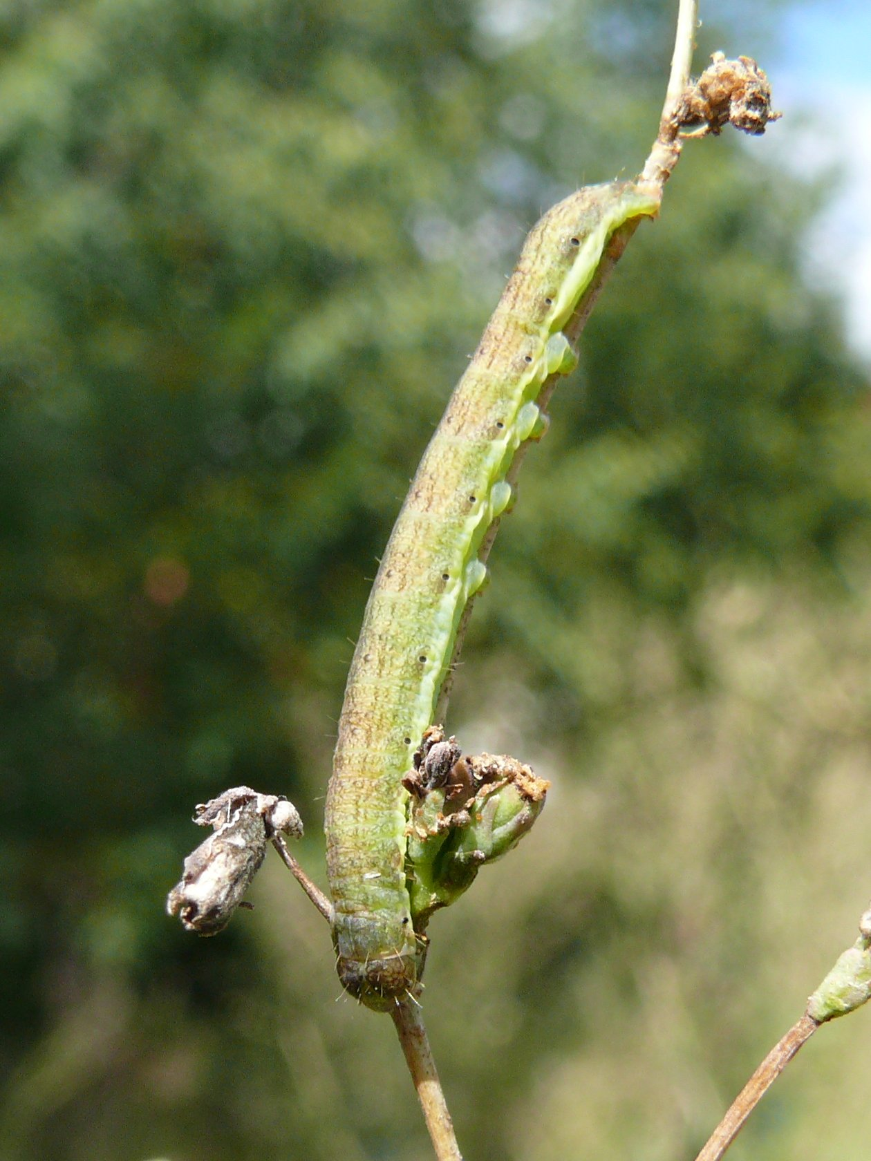 ' Aetheria bicolorata' current name: Hecatera bicolorata